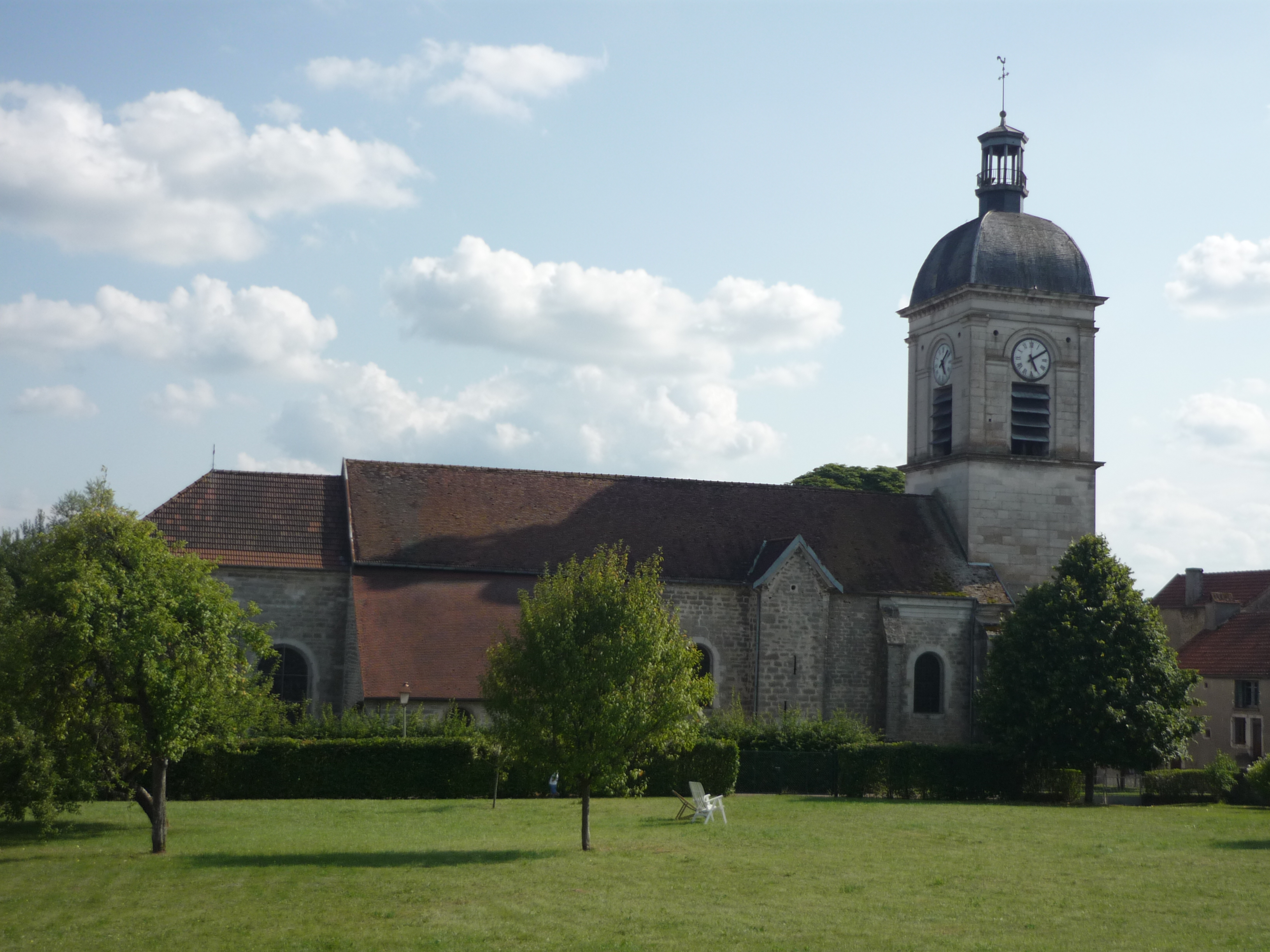 L'église de Dancevoir